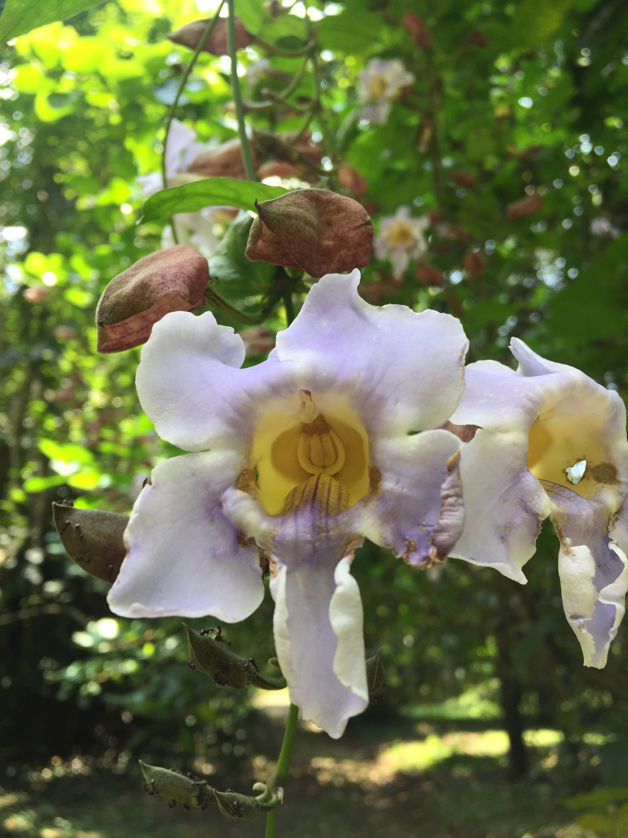 Dua buah bunga Thunbergia grandiflora